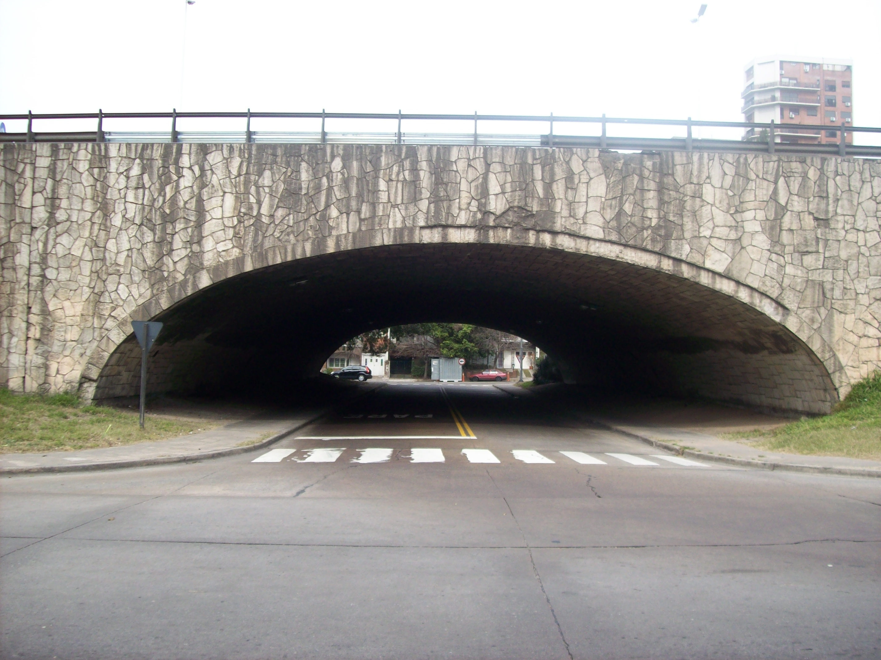 Túnel de la calle Grecia bajo la Avenida General Paz en la Ciudad de Buenos Aires, Argentina. Se aprecia el revestimiento en piedra Mar del Plata.